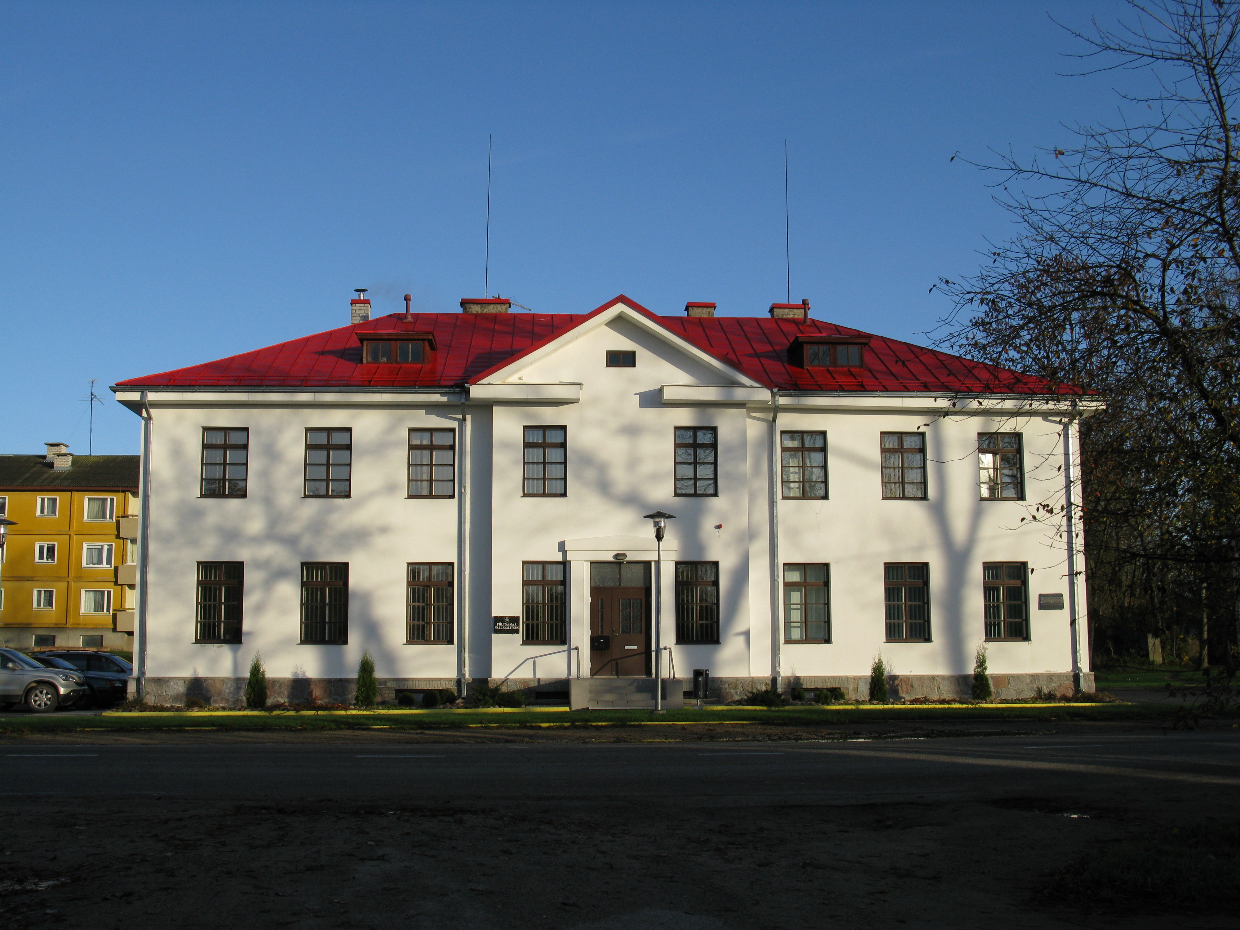 1931-1932 ehitatud Vana-Põltsamaa vallamaja